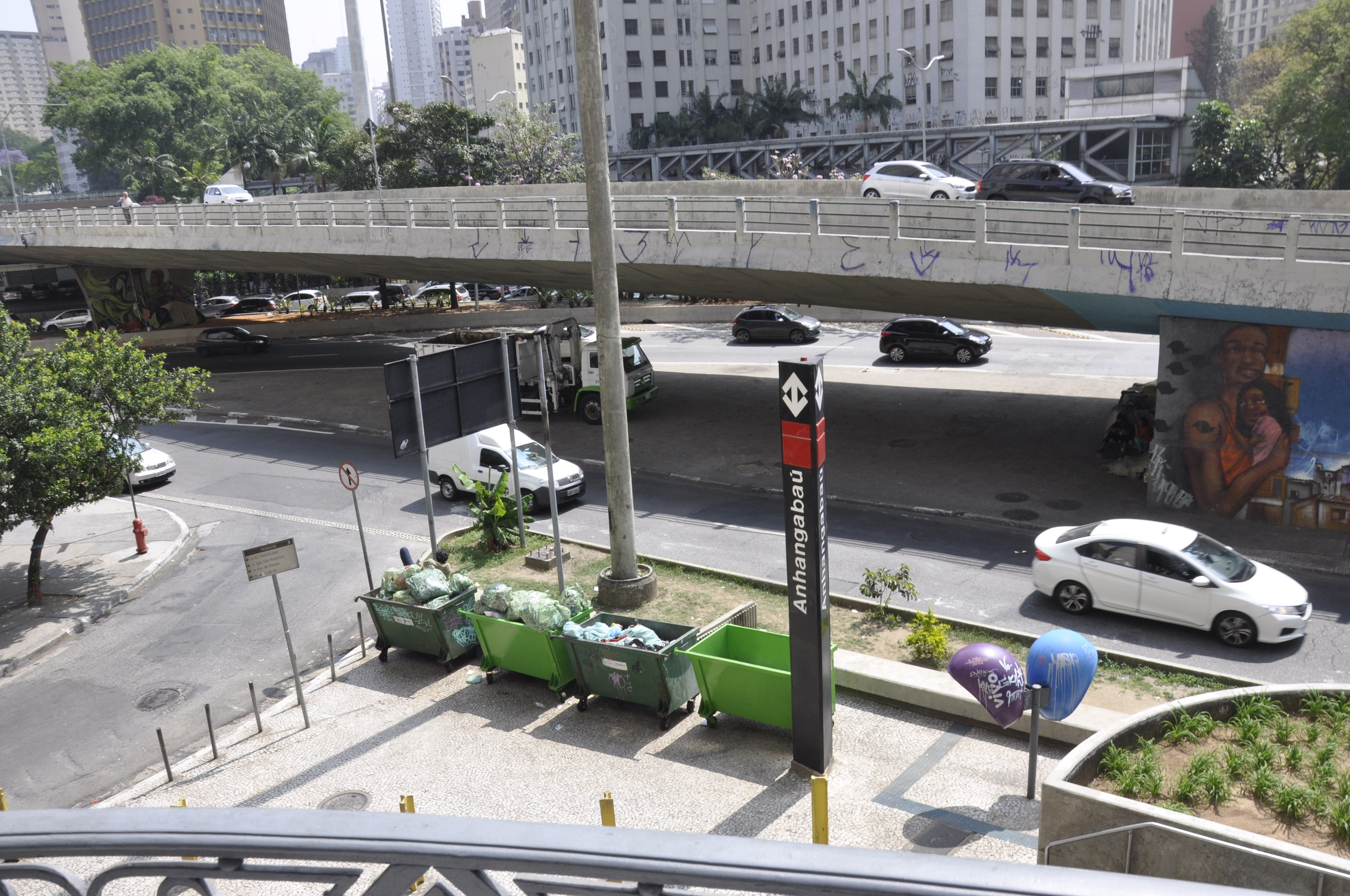 Edificício Riachuelo tem suas varandas voltadas para o Viaduto do Anhangabaú